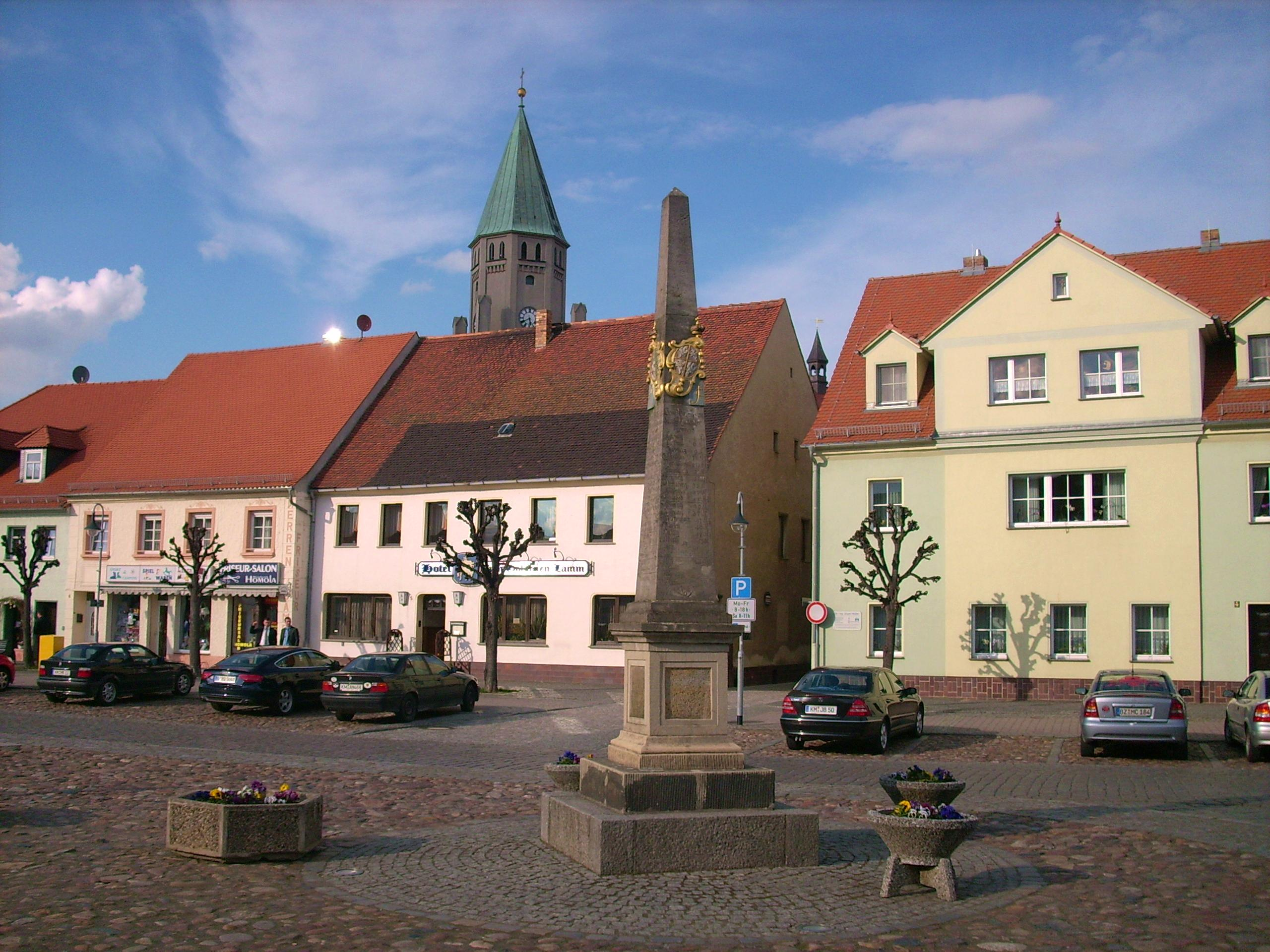 Marktplatz mit Postmeilensäule in Wittichenau